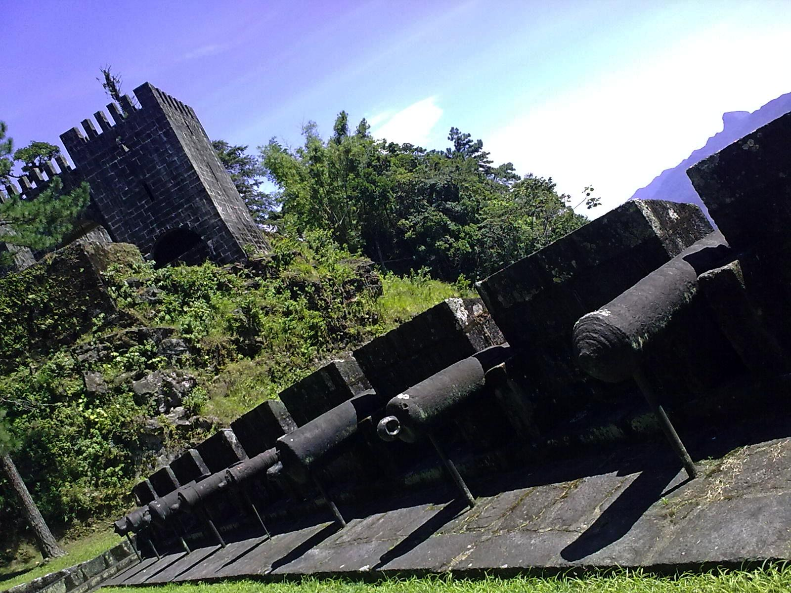 Localizado na subida da serra, antes da Pavelka.